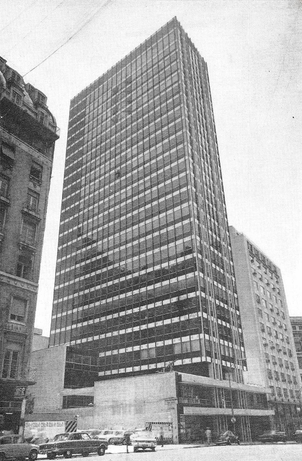 Vista de la torre Club Alemán, en Avenida Corrientes 327. Arquitecto: Mario R. Álvarez y Asociados Año: 1970/72 Estilo: Internacional Buenos Aires, Argentina